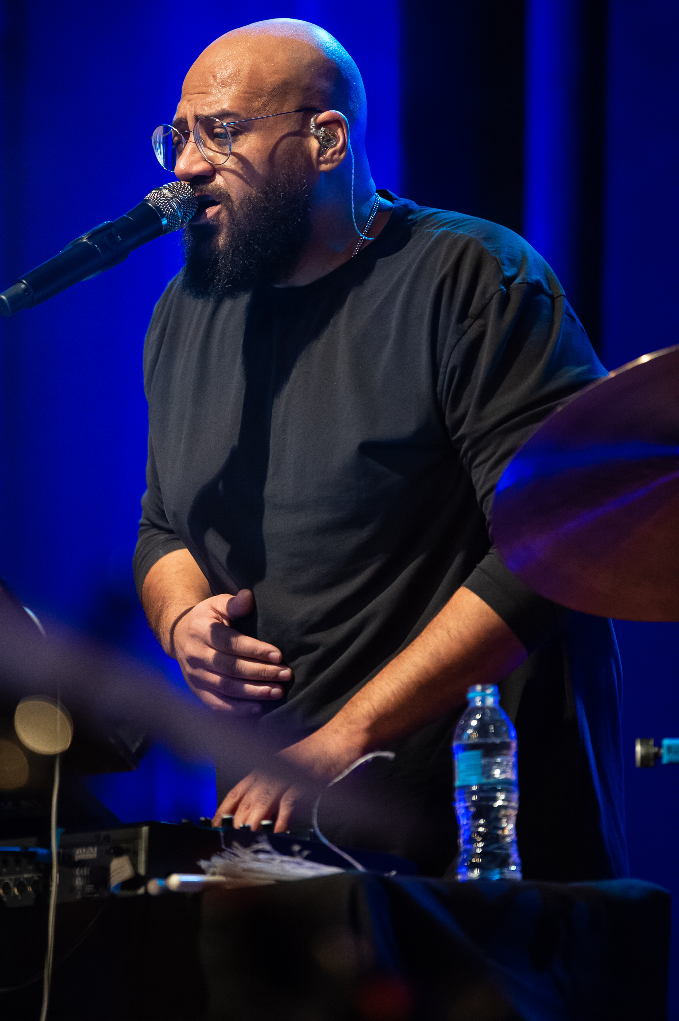 Concertbüro Franken,Glashaus,Konzert,Livekonzert,Livemusik,Markgrafensaal,Moses Peter Pelham,Musik